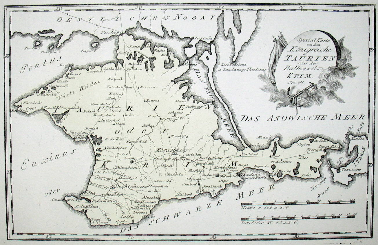 Spezial Karte von dem Königreiche Taurien oder der Halbinsel Krim. Nro. 61. Kolorierter Kupferstich